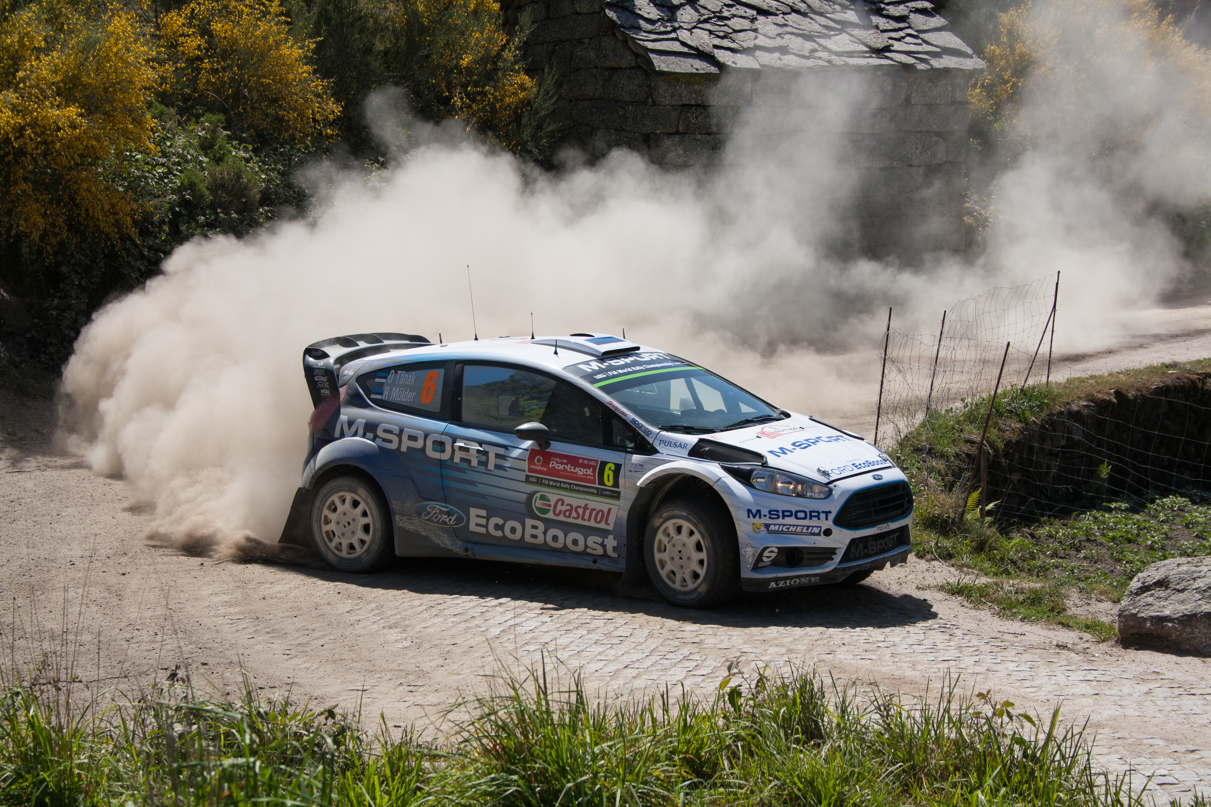 O. Tanak - R. Molder